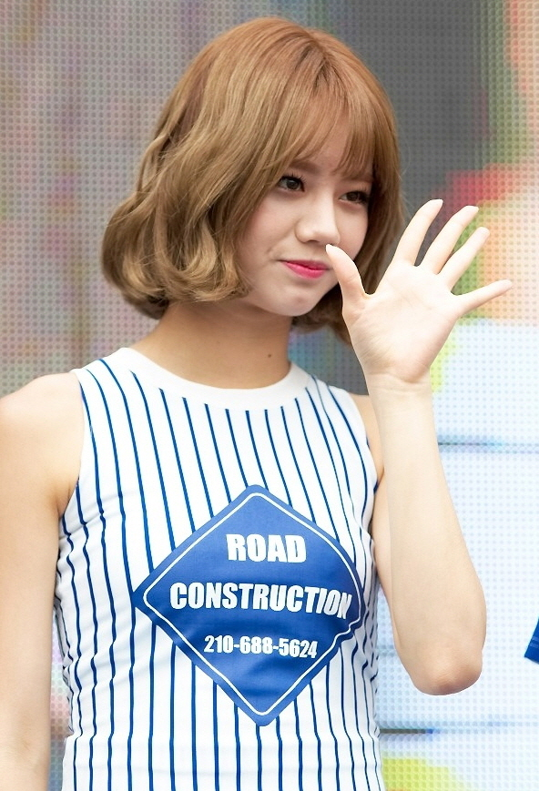 140705 김해 워터파크 미니콘서트